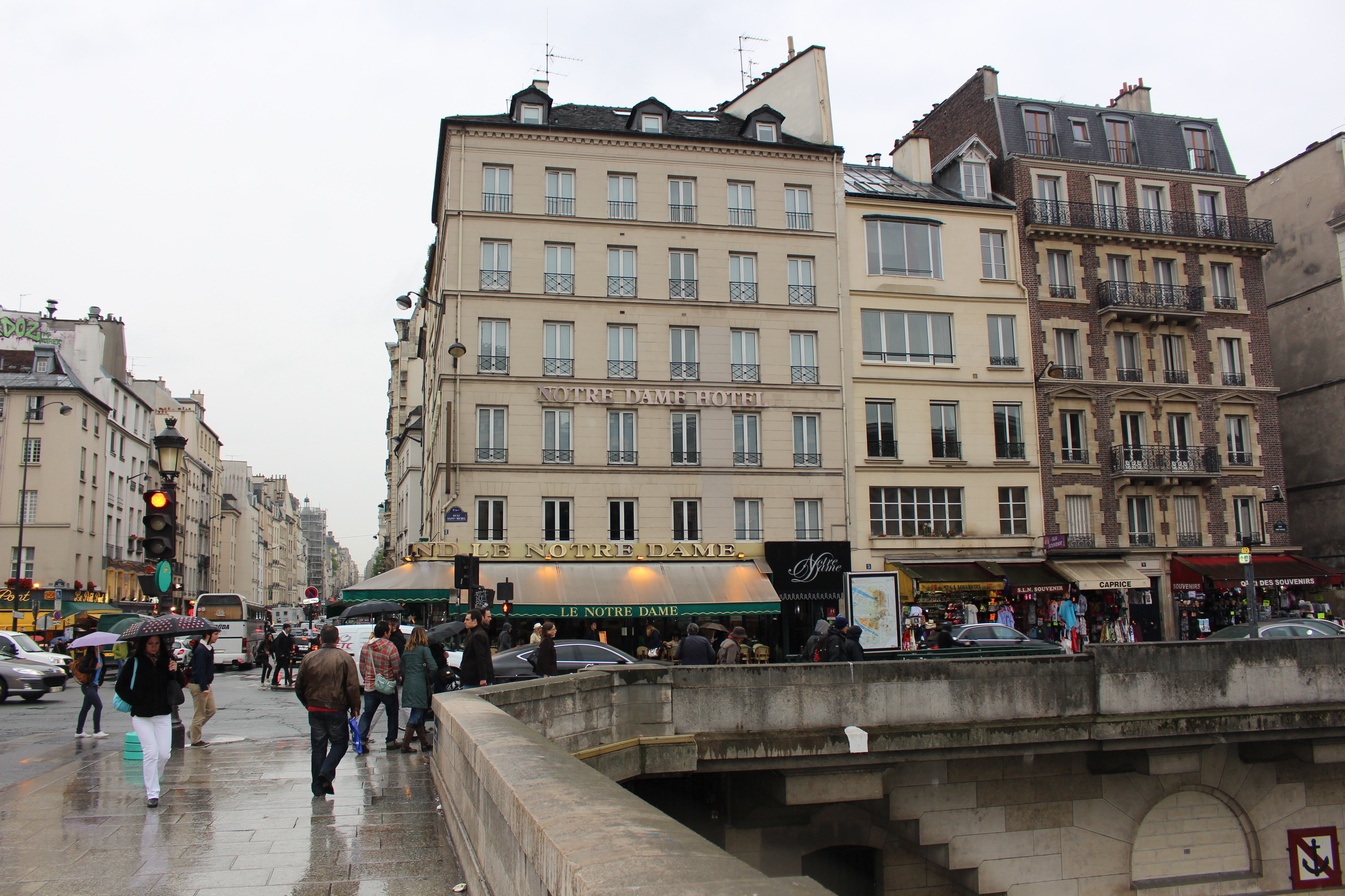 Отель "Нотр-Дам"